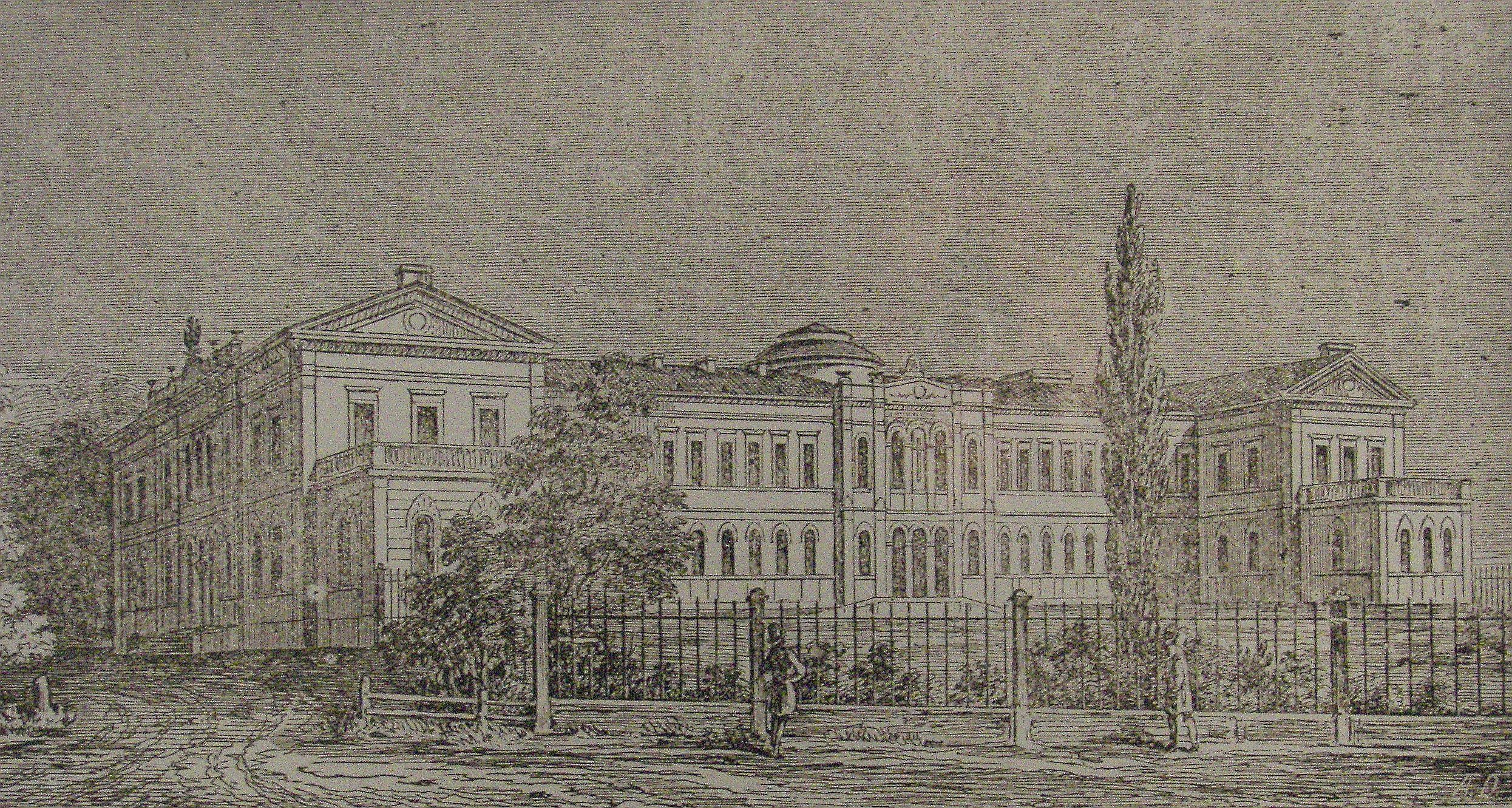 Budynek Instytutu Szlacheckiego przy ul. Wiejskiej w Warszawie 1852 r. wg grafiki A. F. Dietricha. Siedziba Sejmu od 10 lutego 1919, zdjęcie wykonane 24 stycznia 2007 roku, autor: Piotr VaGla Waglowski